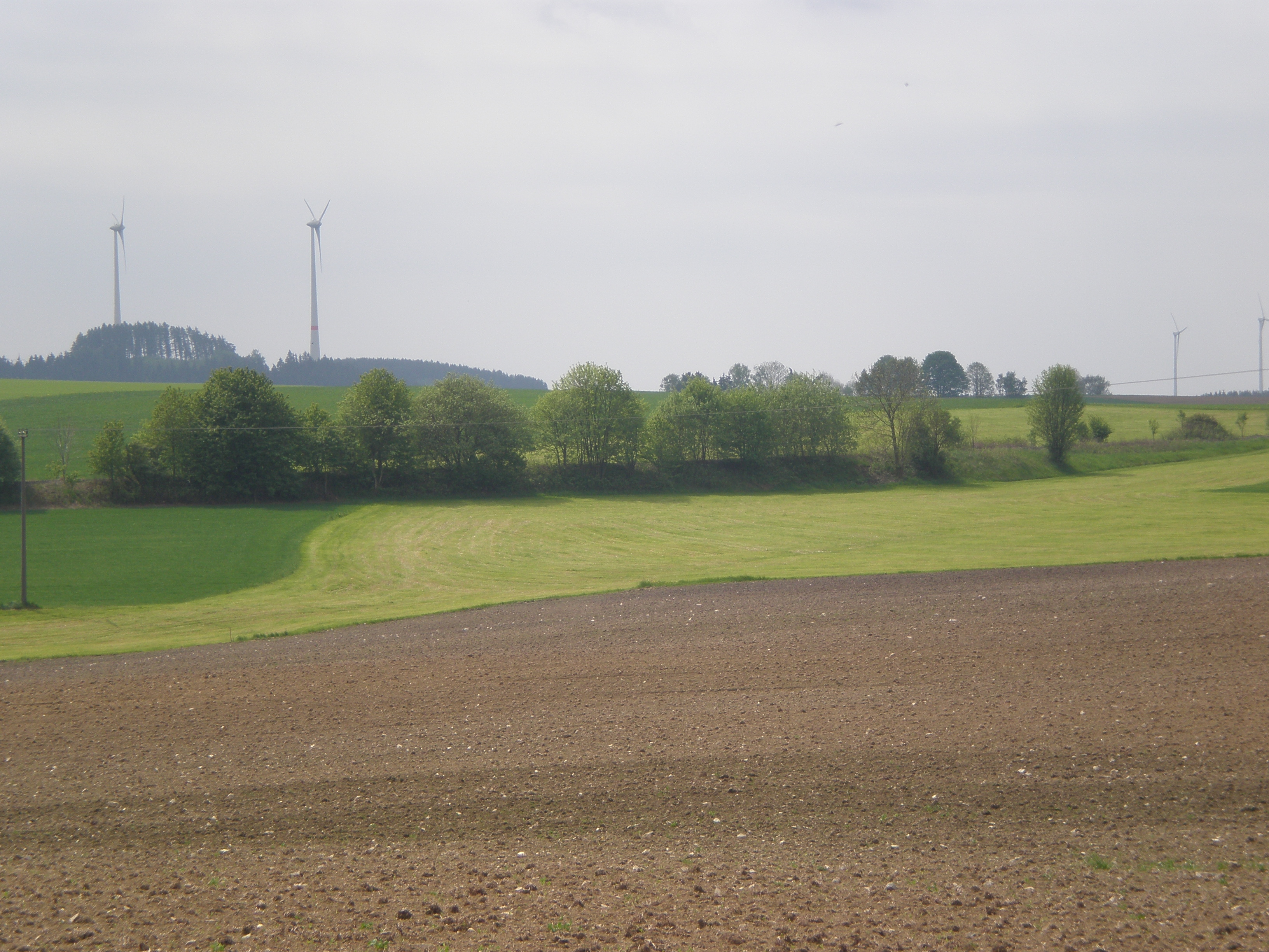 Der ehemalige Bahndamm der Lokalbahn Falls-Gefrees zwischen Falls und Streitau